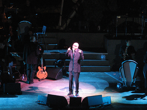 Mario Biondi con The High Five Quintet" e "The Duke Orchestra" foto scaricata da